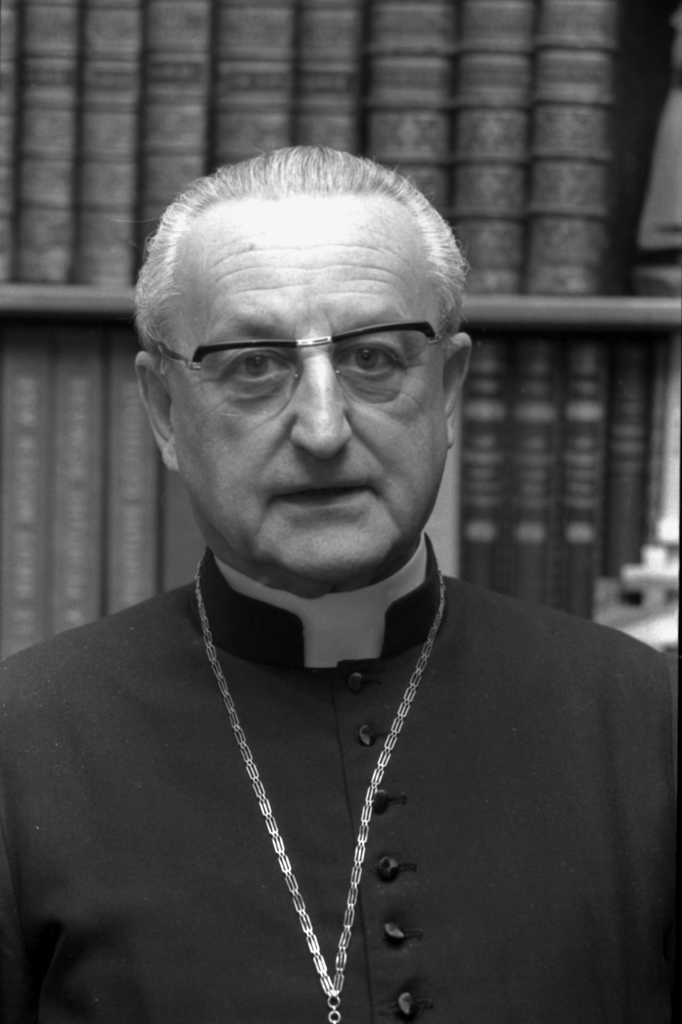 Mgr Léon-Arthur Elchinger, archevêque-évêque du diocèse de Strasbourg en 1980.